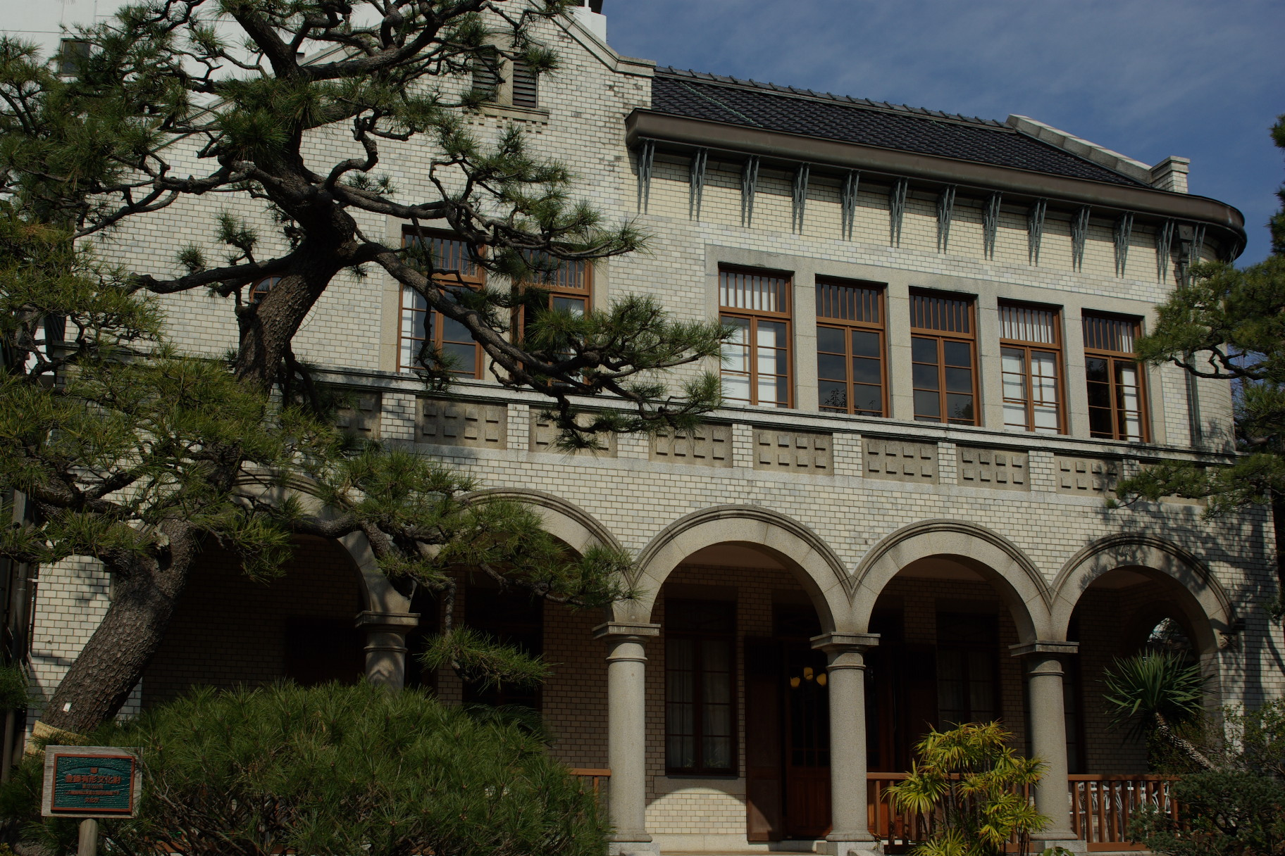 千葉市稲毛区にある旧神谷伝兵衛稲毛別荘